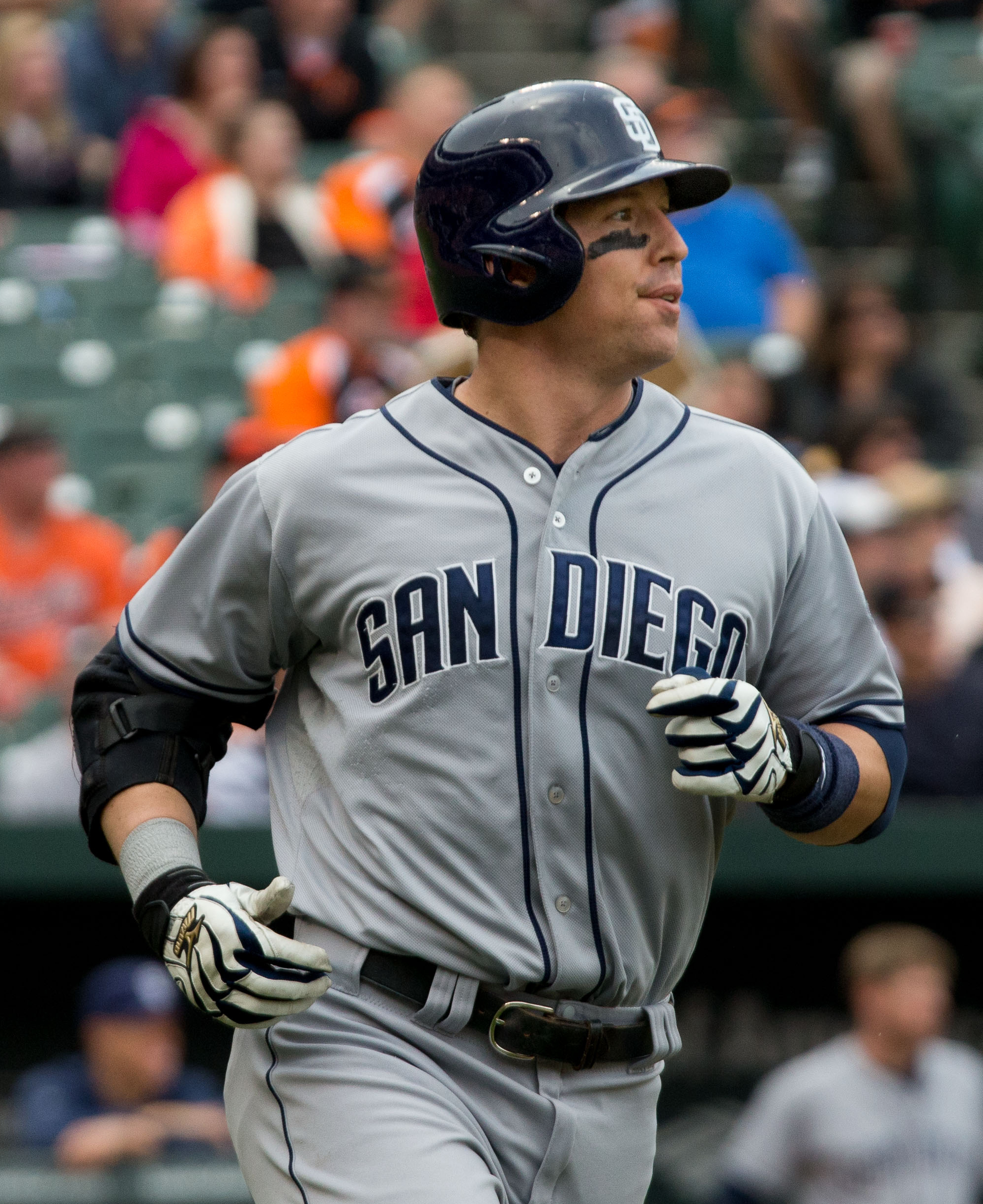 John Baker